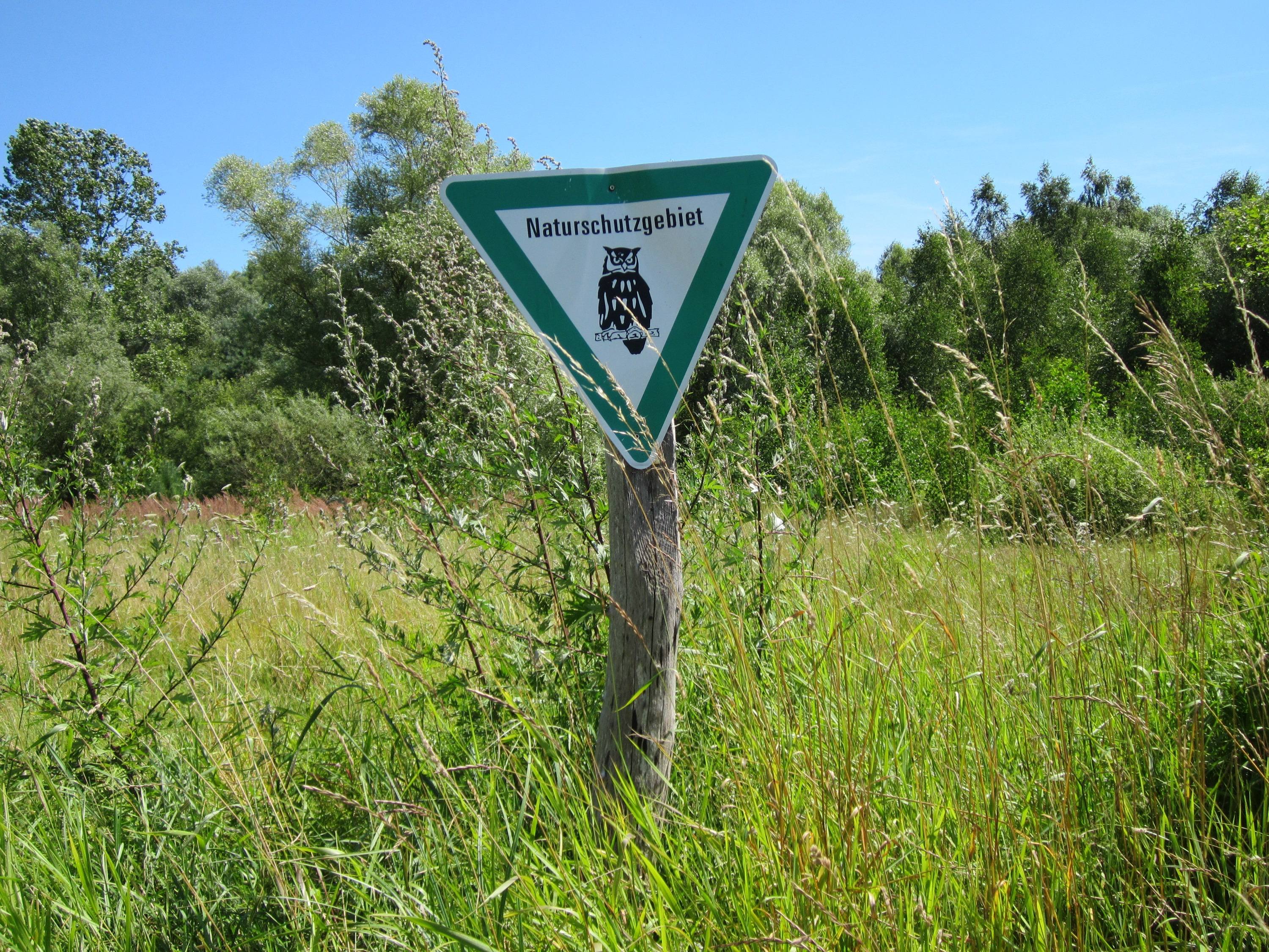 Naturschutzgebiet "St. Arnualer Wiesen"